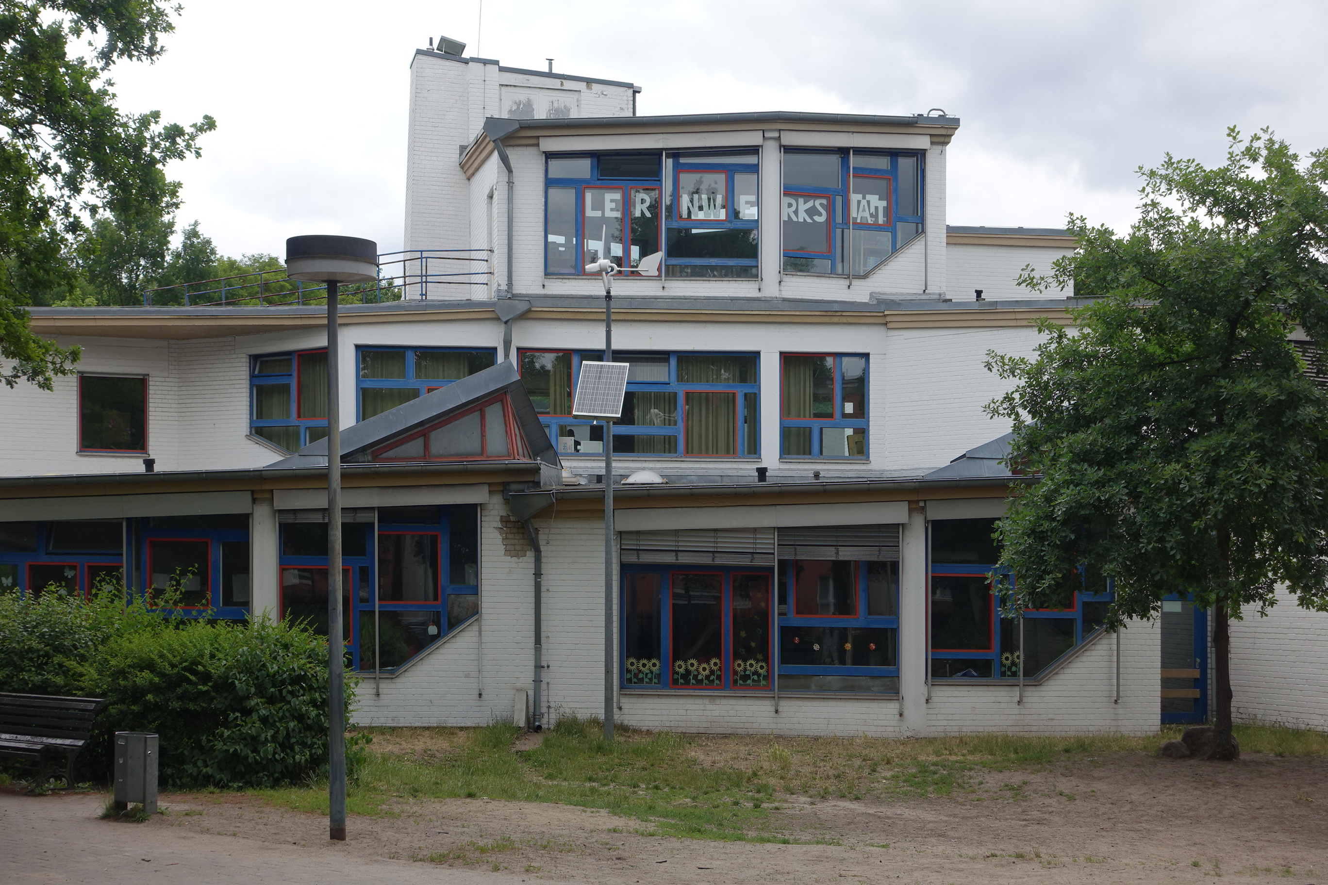 Kindergarten